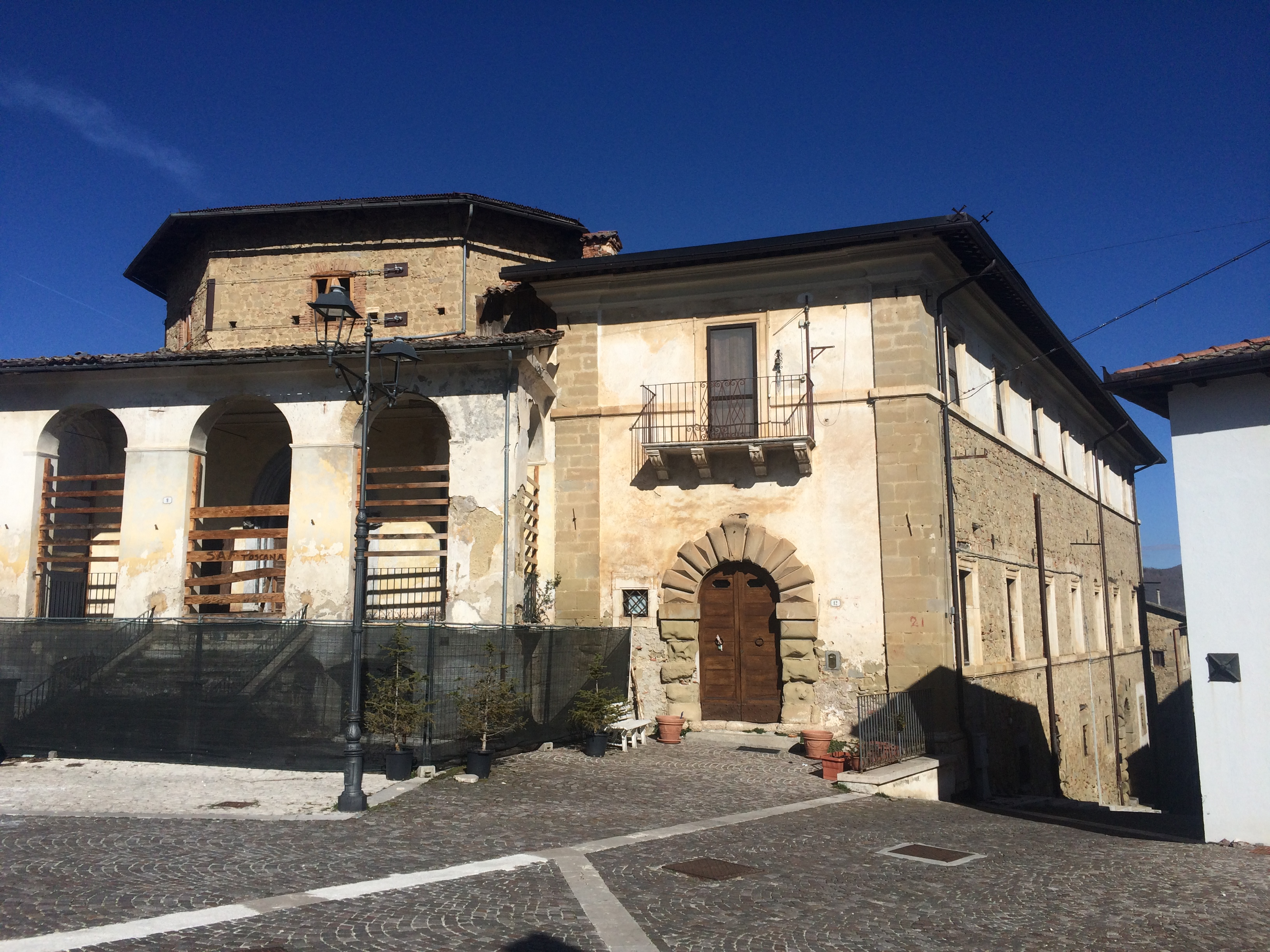 Il palazzo Farnese Cassiani a Montereale (AQ).